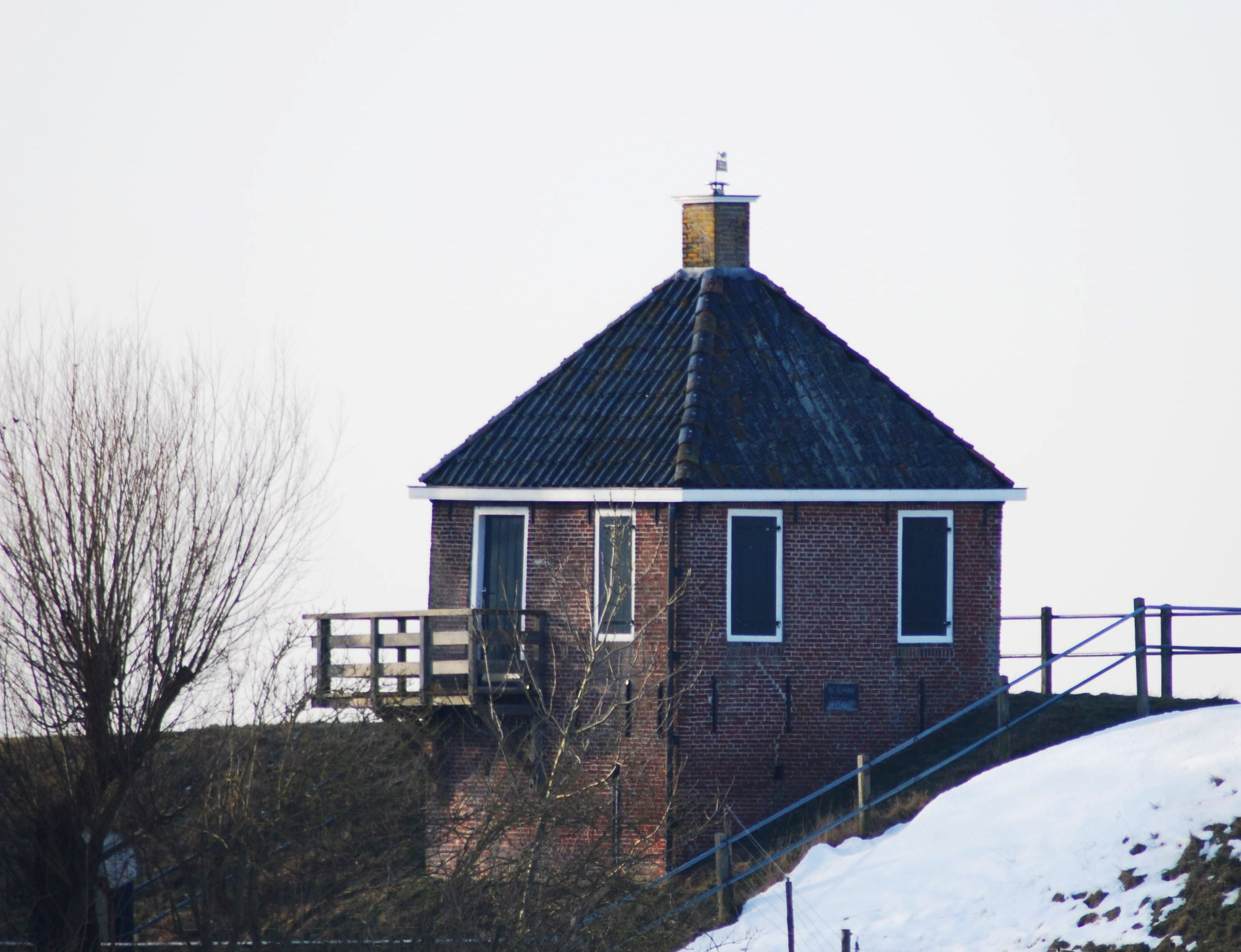 Contributiehuisje op de Rintjeshoek in Kollumerpomp